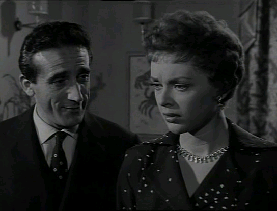 Scena del film Cantami "Buongiorno tristezza"